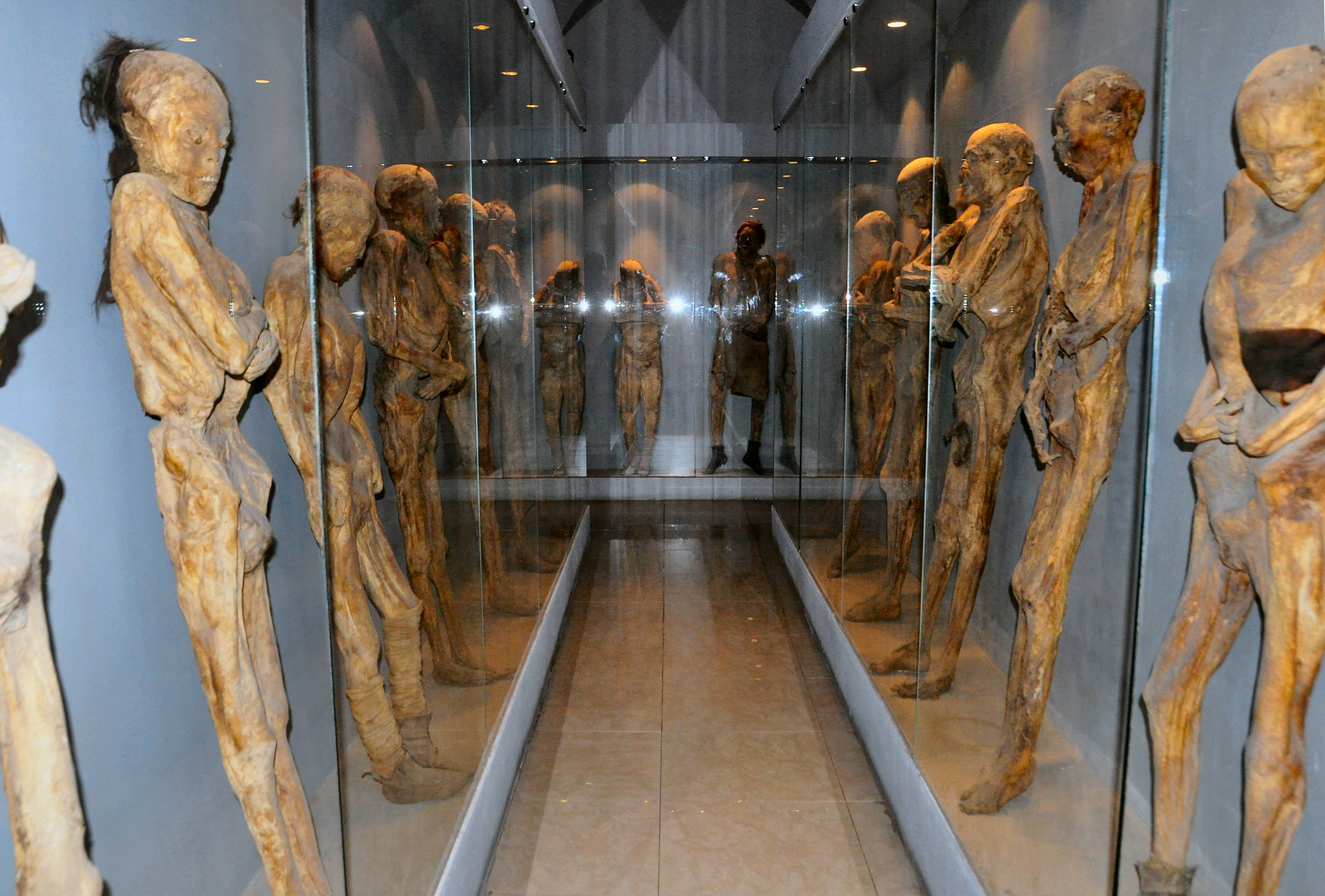 Museo de Las Momias (mummy museum) in Guanajuato, Mexico.